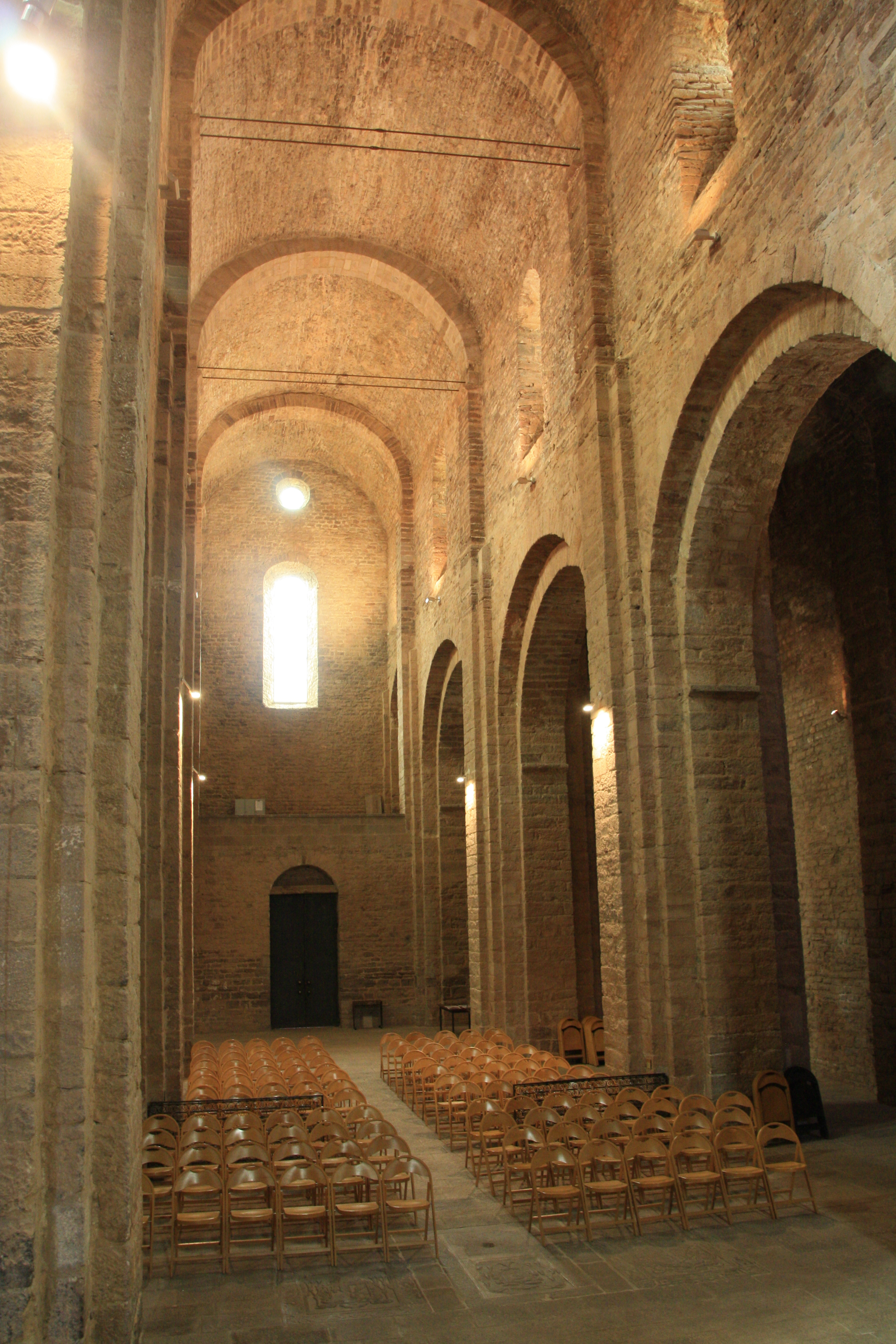 Cardona, 31 de maig de 2014